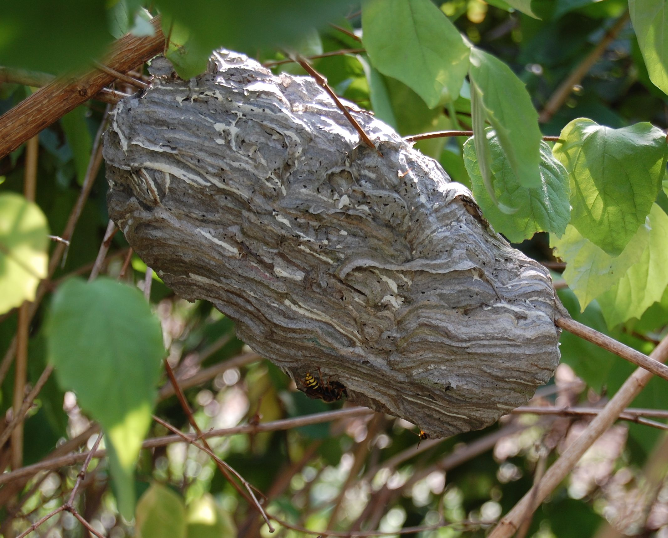 Dolichovespula media, Nest in Busch, Berlin-Köpenick